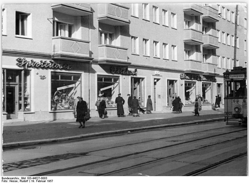 Berlin, Kastanienallee, Geschäfte Zentralbild Hesse 19.2.1957 Neue Geschäfte im Wohnblock Schwedter Strasse am 15. Februar 1957 wurden im Wohnblock Schwedter Strasse vier neue Geschäfte eröffnet. UBz: blick auf die Läden in der Kastanienallee.